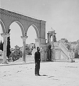 דוכן הקיץ מתוך אוסף תצלומים שצולם בין השנים 1898-1946 בירושלים